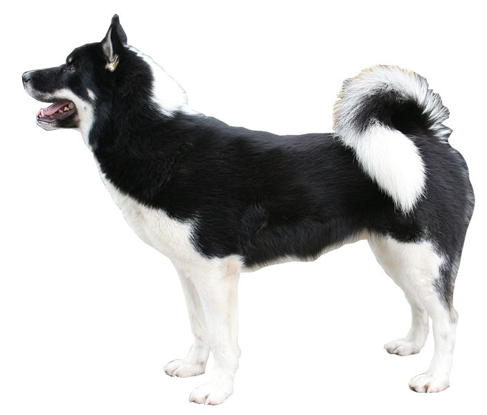 Chien du Groenland sur fond blanc